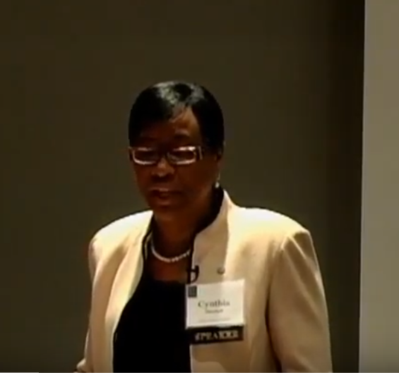 Cynthia Marshall pada 2012